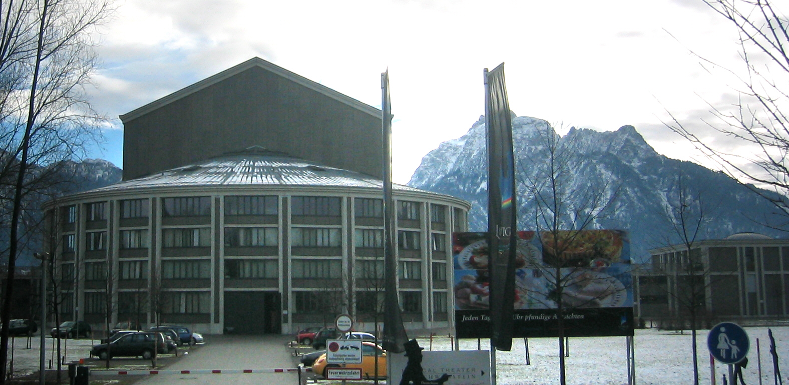 Füssen, Germany: Musical Theater Neuschwanstein